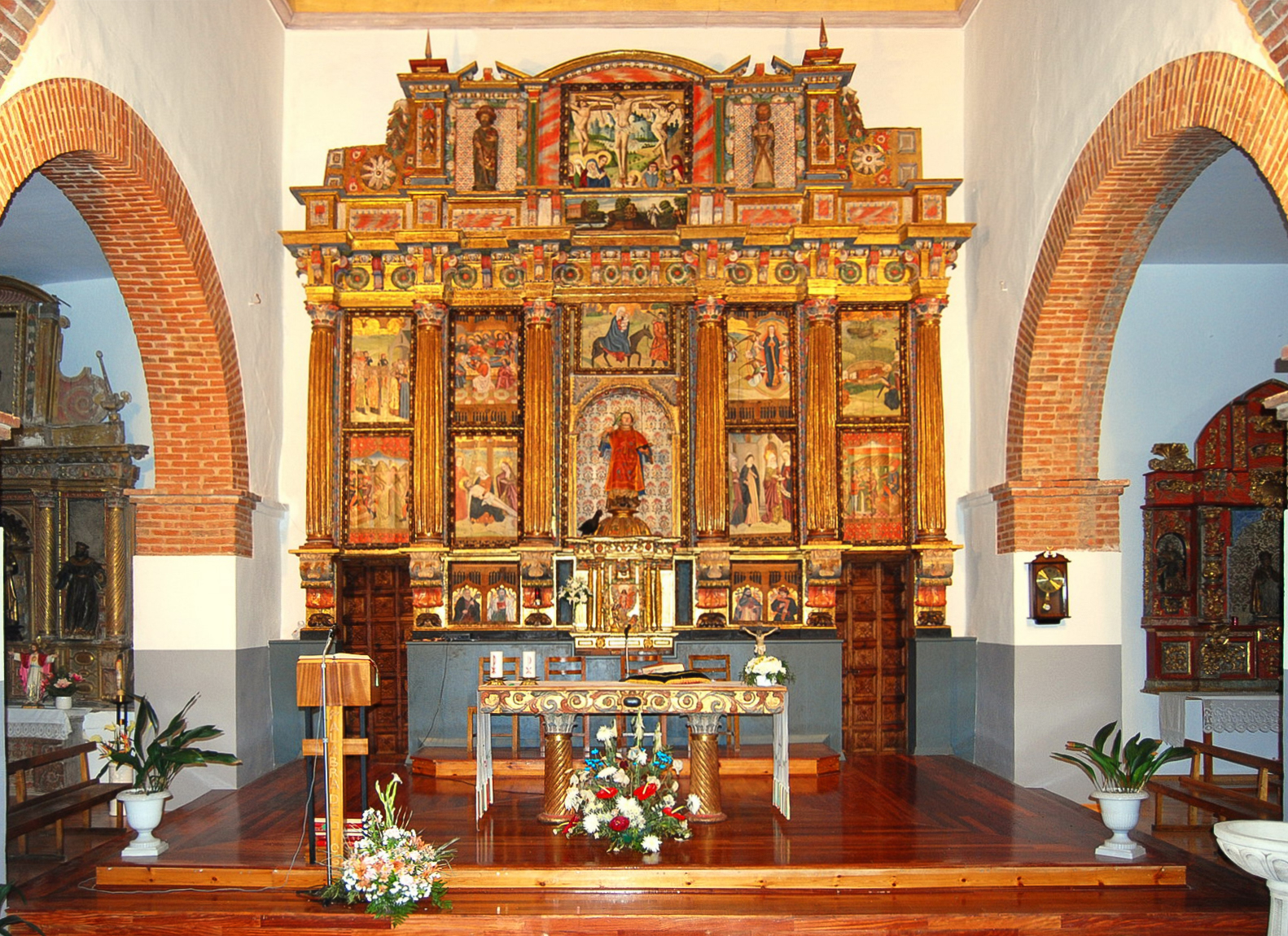 Retablo restaurado en el año 2009 con fondos de la Fundación del Patrimonio Histórico de Castilla y León y la colaboración económica de todos los vecinos de Bercianos del Páramo